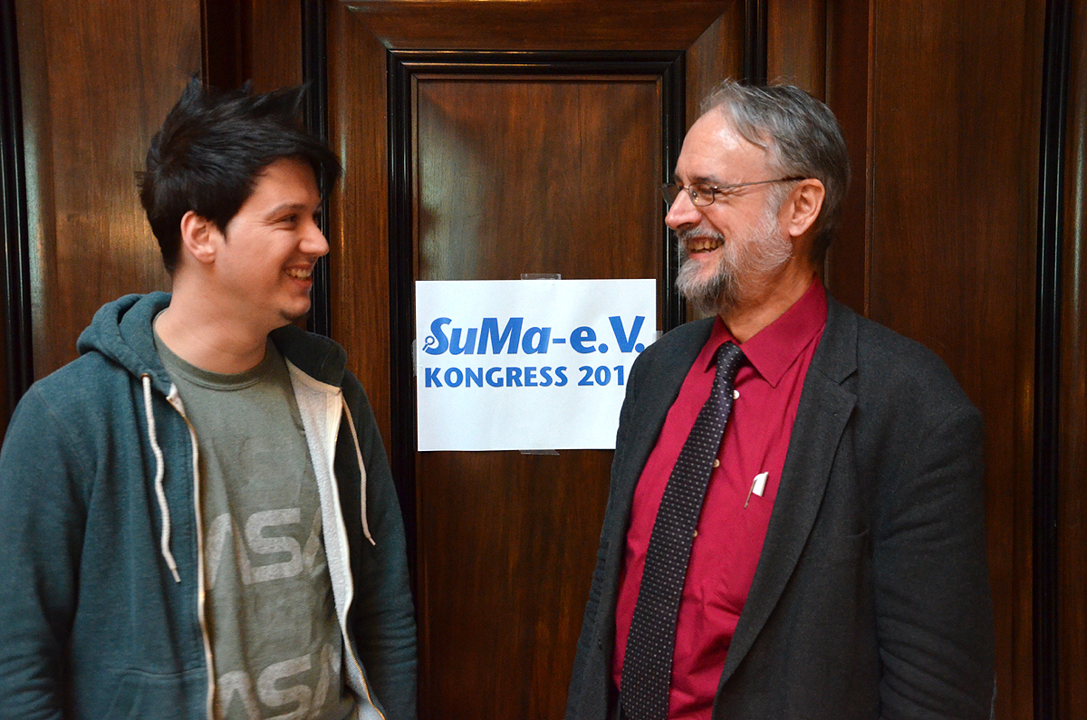 Ein Bild(ungs-)Dokument vom SUMA-Kongress & Award „Wege aus der Überwachungskatastrophe“ 2014 im Neuen Rathaus von Hannover ...